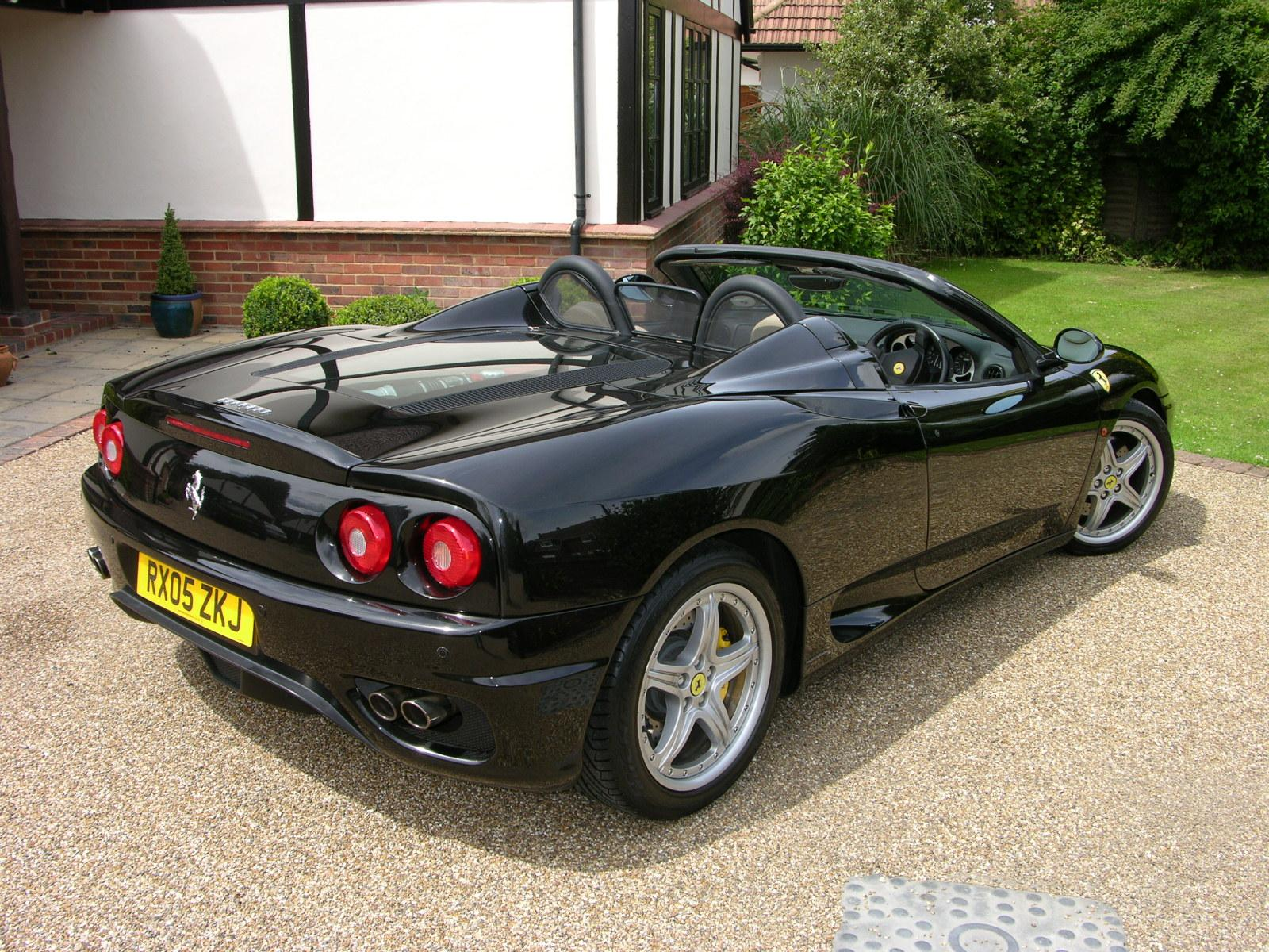 2005 Ferrari 360 Spider F1